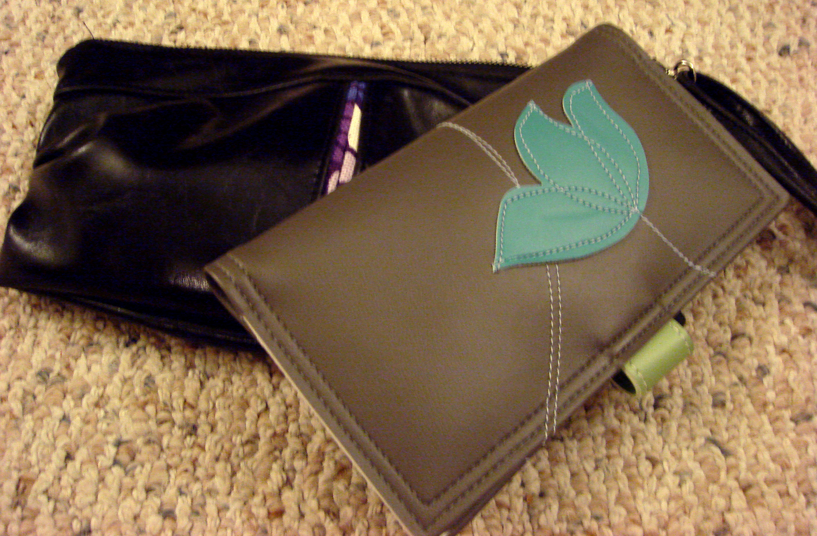 תיק וארנק טבעונים